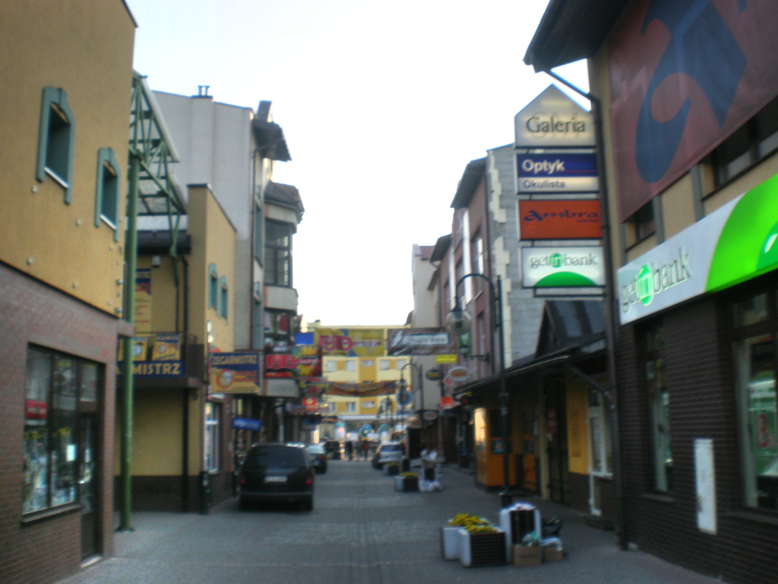 Ulica Sienkiewicza tzw."Kocia" w Jaworznie.